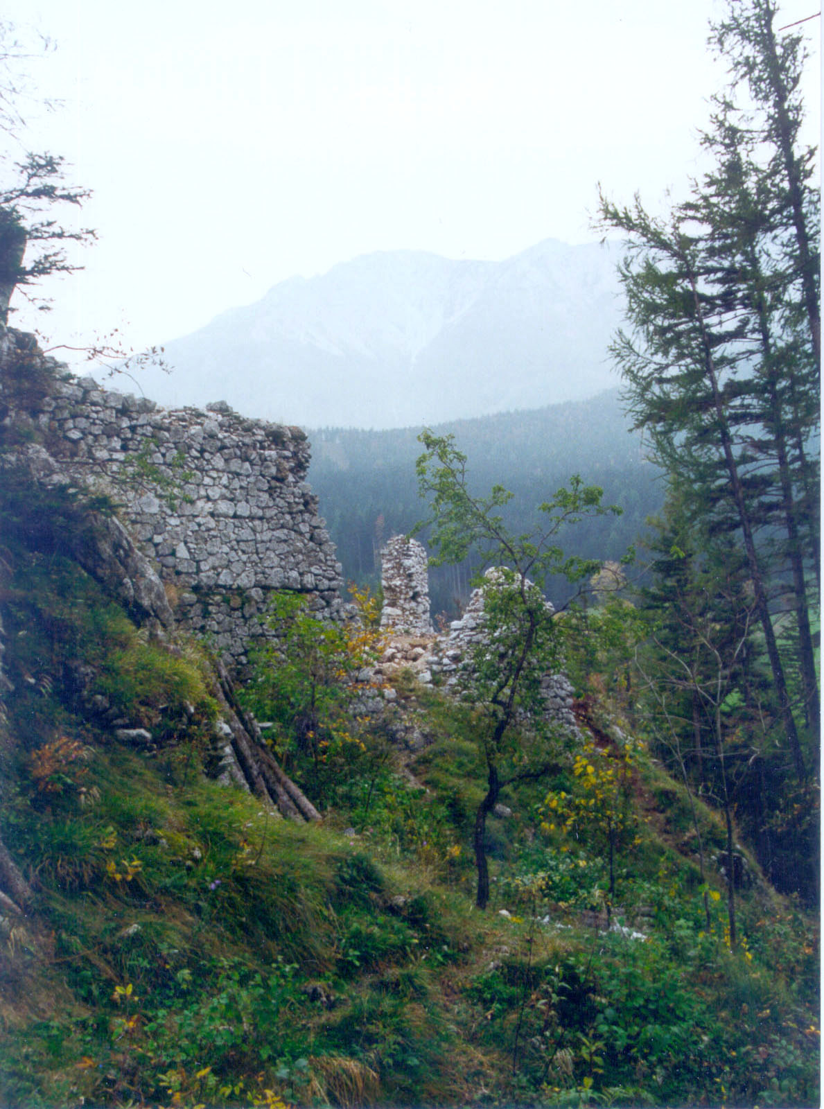 Erhaltene Mauerreste der Burgruine Losenheim